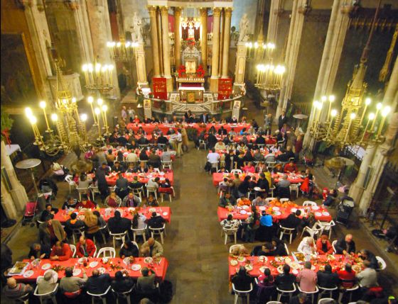 Comunitat de Sant Egidi. Dinar de Nadal a l'església dels Sants Just i Pastor, Barcelona